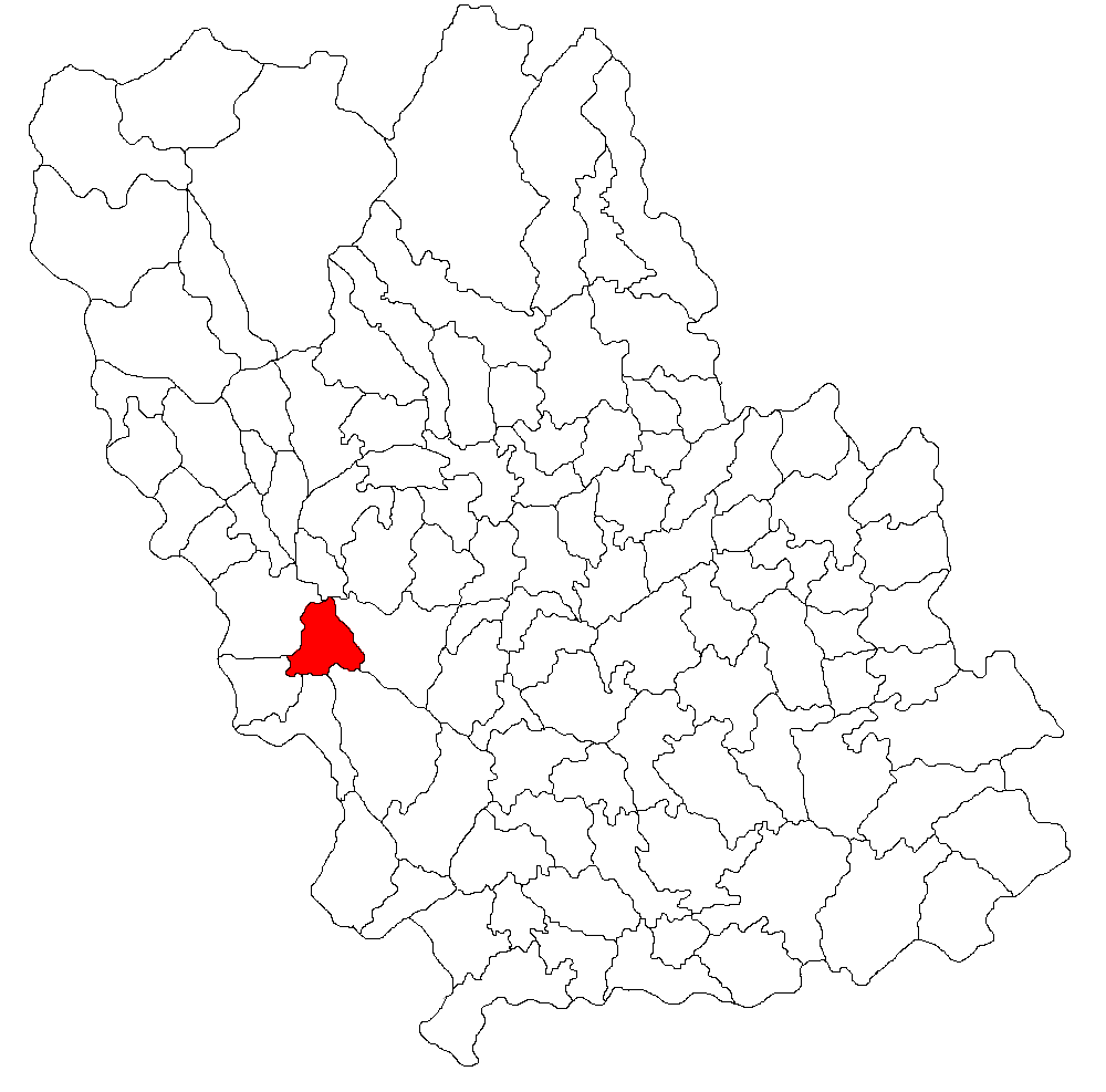 Categorie:Hărţi ale judeţului Prahova